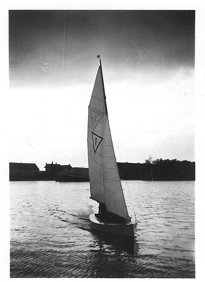 zaanklasse 1